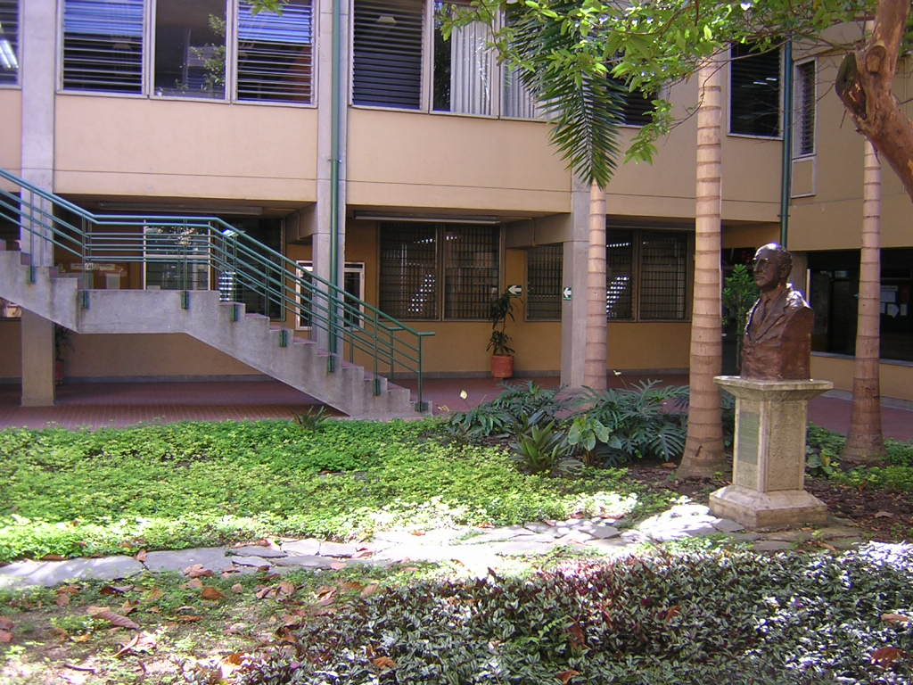 Facultad de Salud Pública, Universidad de Antioquia. Medellín, Colombia.